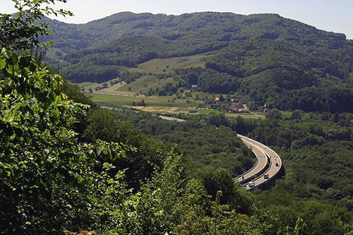 Aaretalviadukt der Autobahn A3 zwischen Habsburg und Schinznach Dorf, 25. Mai 2004